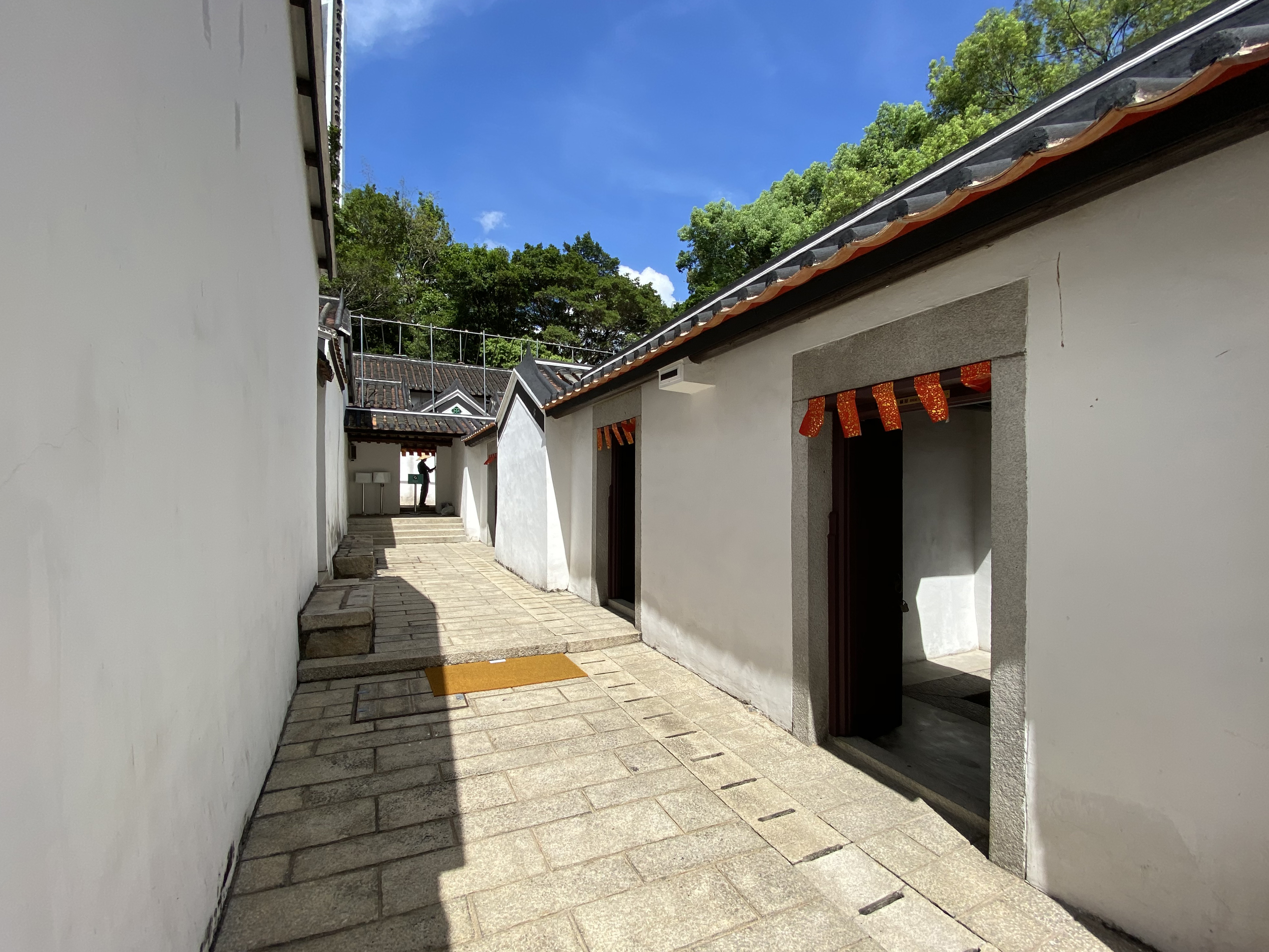 Sam Tung Uk